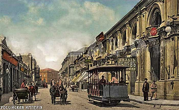 открытка Дореволюционной России.